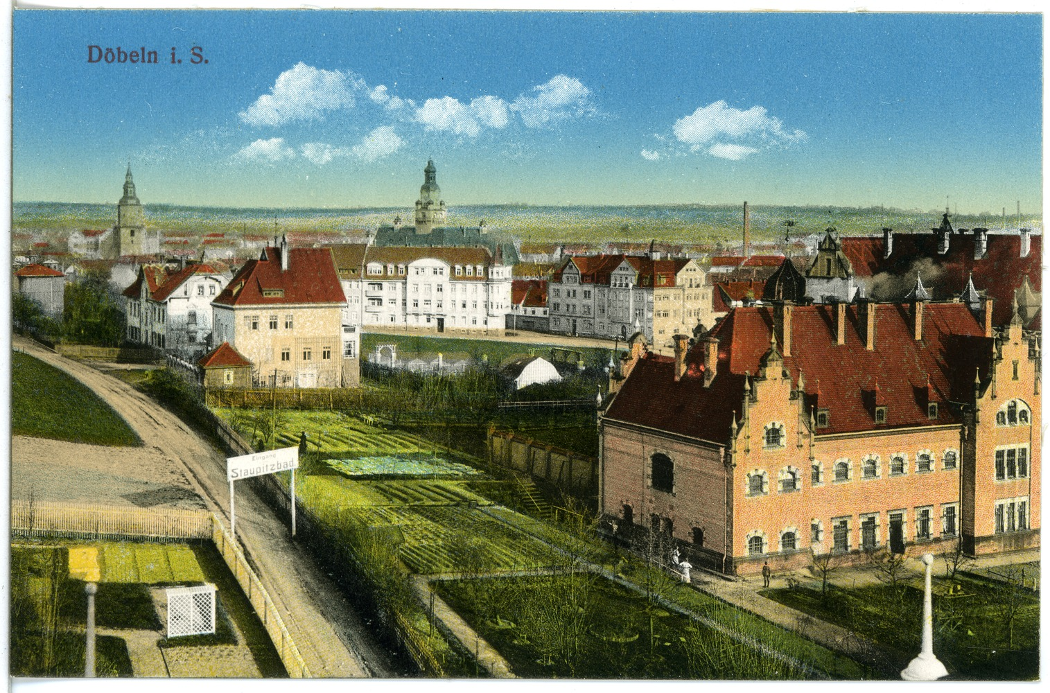 Döbeln; Blick auf Döbeln This postcard is from publisher Brück & Sohn in Meißen ( postcard has a unique number 19172 and is available in a higher resolution at the publisher. This images was uploaded in a cooperation project between Wikipedians and the publisher.